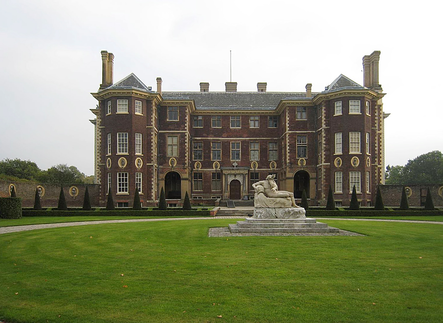 Ham House, Richmond, London: Eingangsseite und Eingangshof mit Statue eines Flussgottes